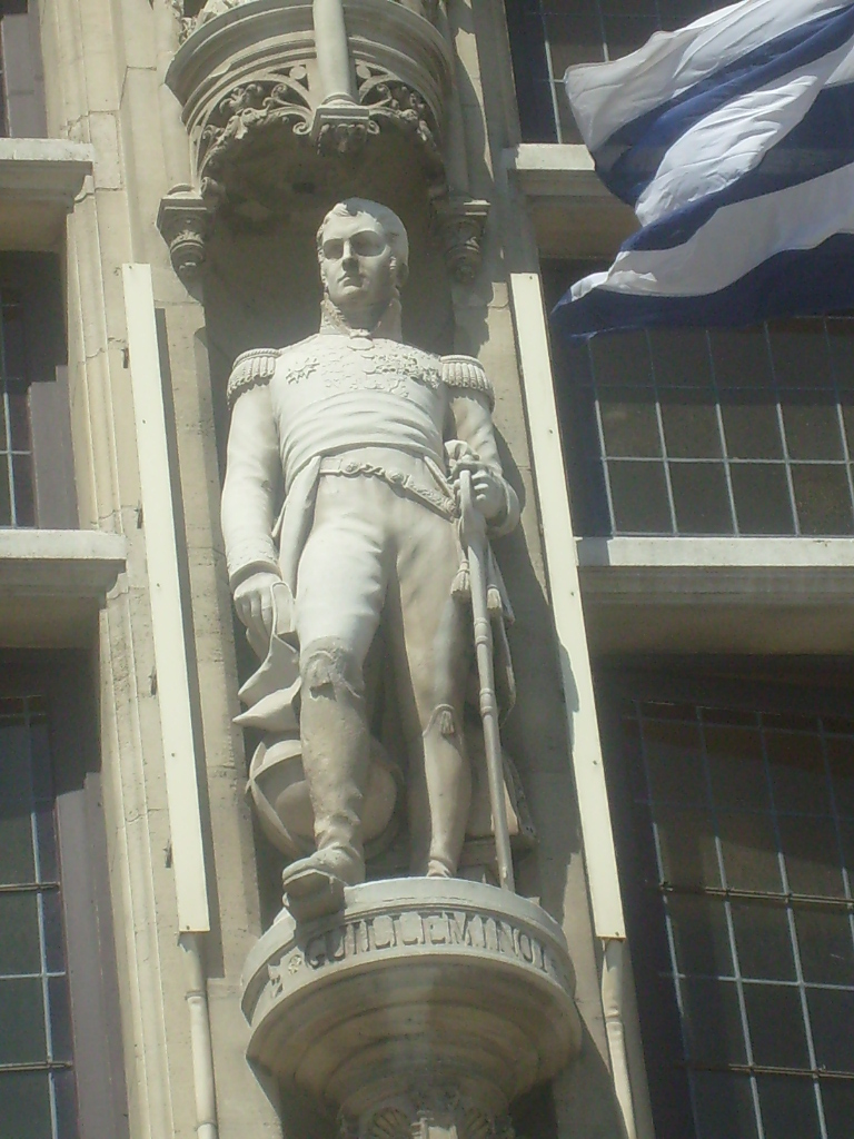 Statue de Guilleminot sur la façade de l'hôtel de ville de Dunkerque